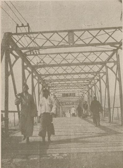 无锡之名胜古迹（六）：吴桥 无锡市政 1930 年第4 期